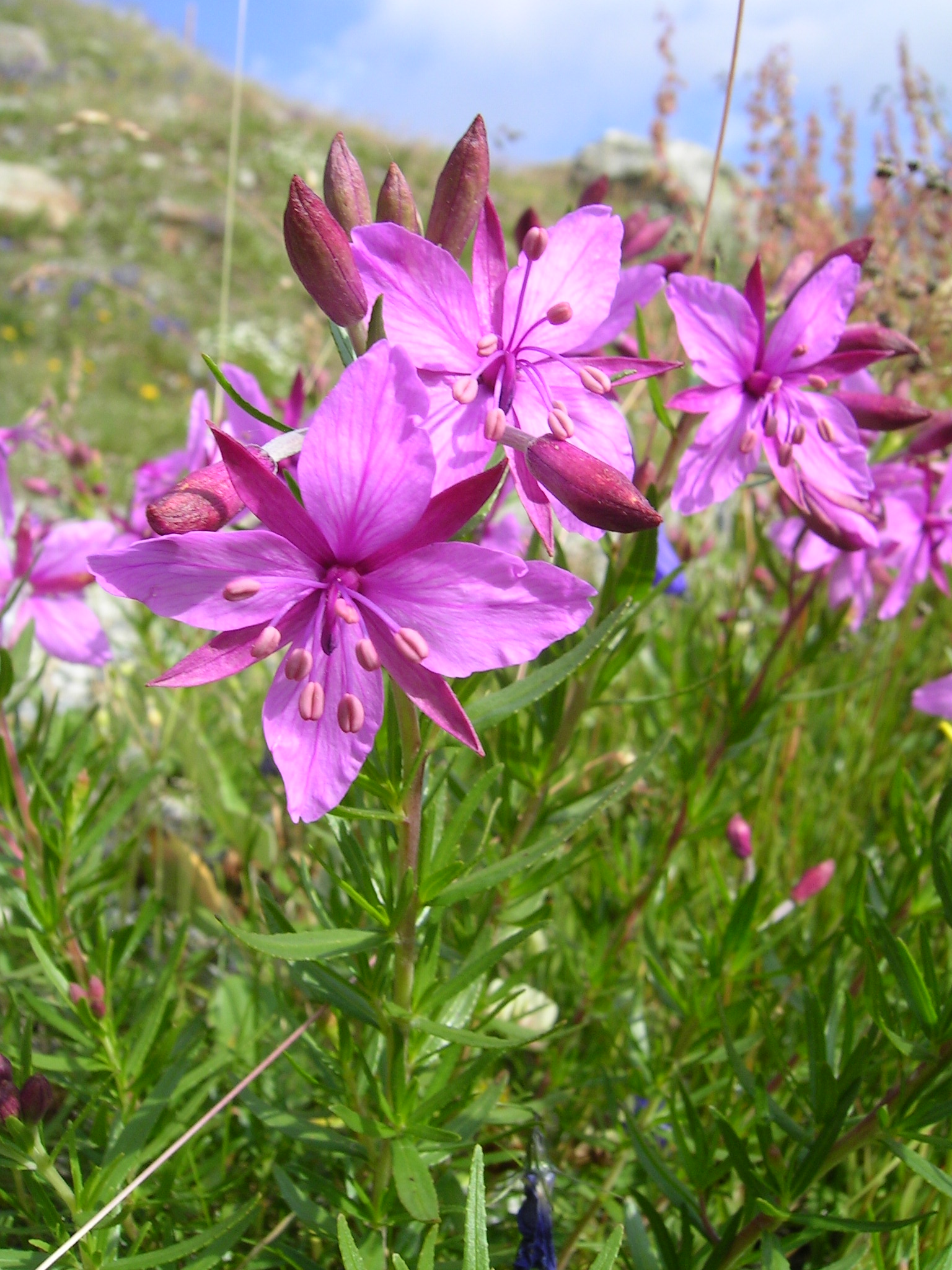 (en) Epilobium fleischeri (de) Fleischers Weideröschen (Epilobium fleischeri) Place/Ort: Berner Oberland, CH. Steingletscher, beim See.